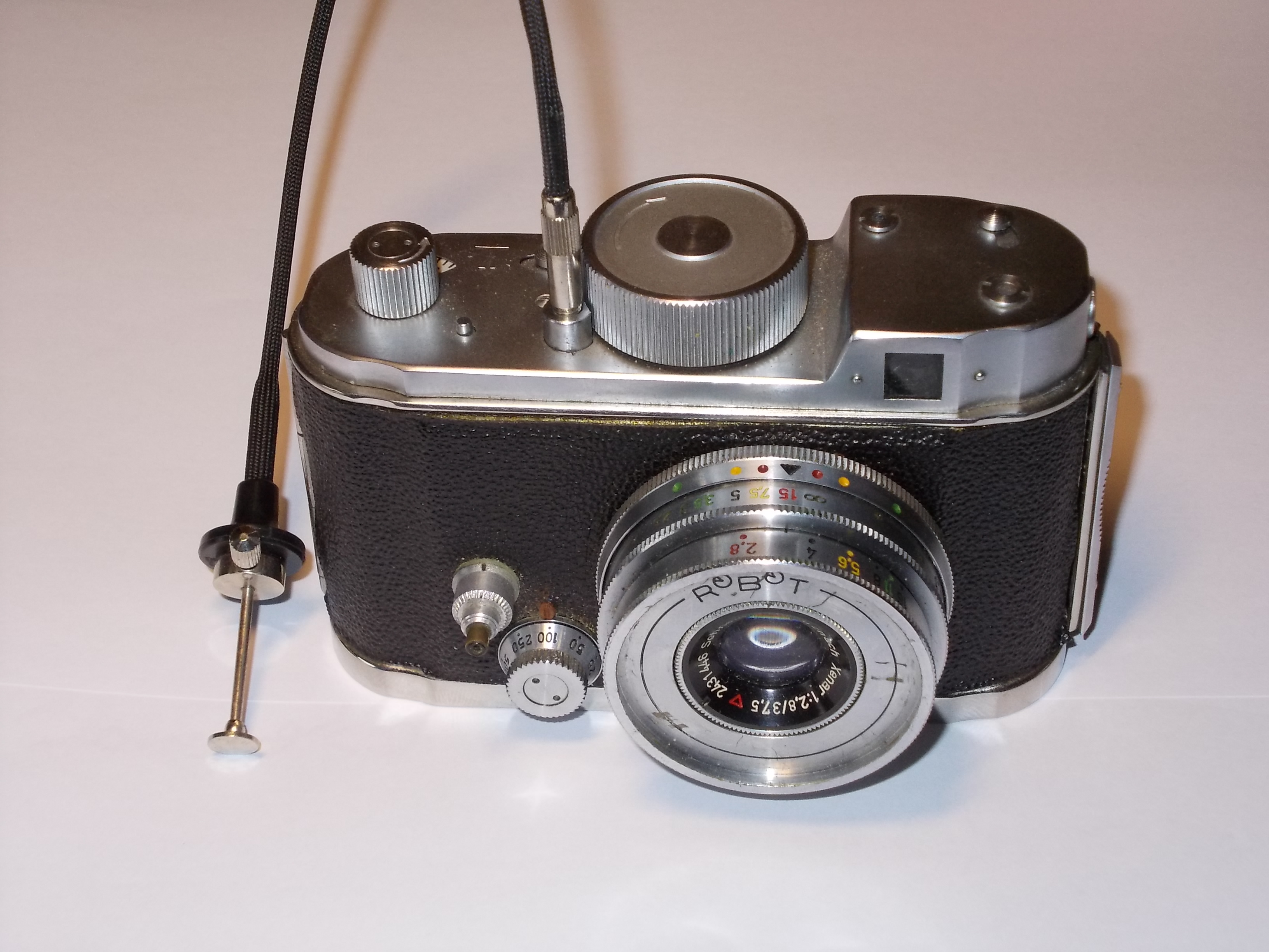 Kamerao Robot